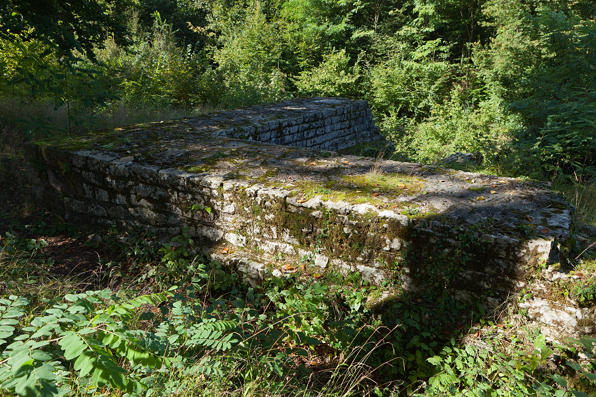 Fahrgraben (Möhlin AG), ein Teil der spätrömischen Rheinbefestigung